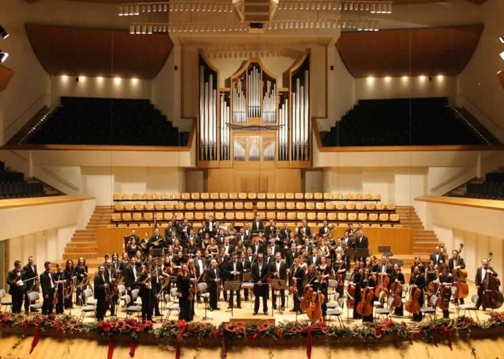 Sección 1 de 3 de la Imperial Orchestra.